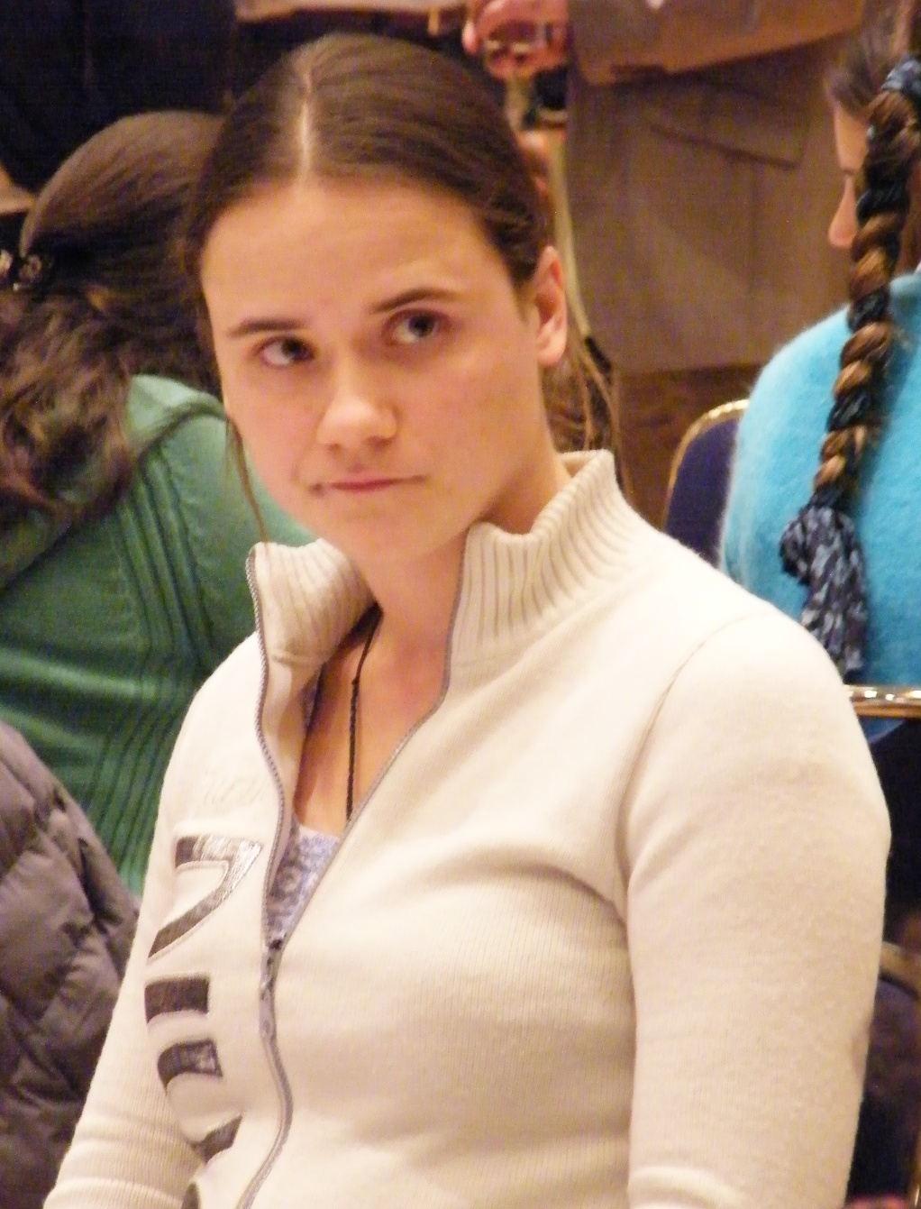 Nadeschda Azarowa bei der 38. Schacholympiade in Dresden 2008